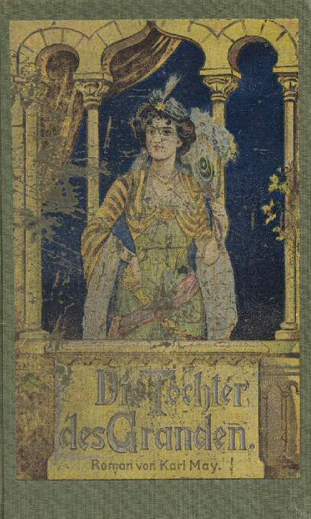 Buchdeckel der 1902 erschienenen Fischer-Ausgabe der Erzählung Die Tochter des Granden aus dem Fortsetzungsroman Waldröschen von Karl May